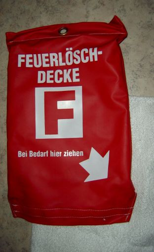 Löschdecke mit geöffneter Hülle fotografiert K.Gruber 20.9.2004